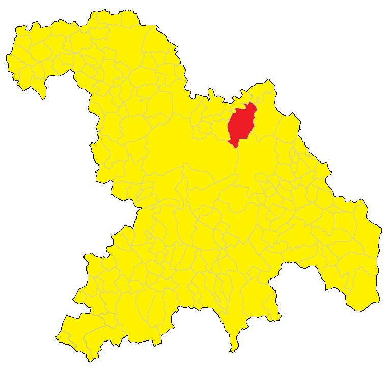 Mappa del comune di Sale (AL)